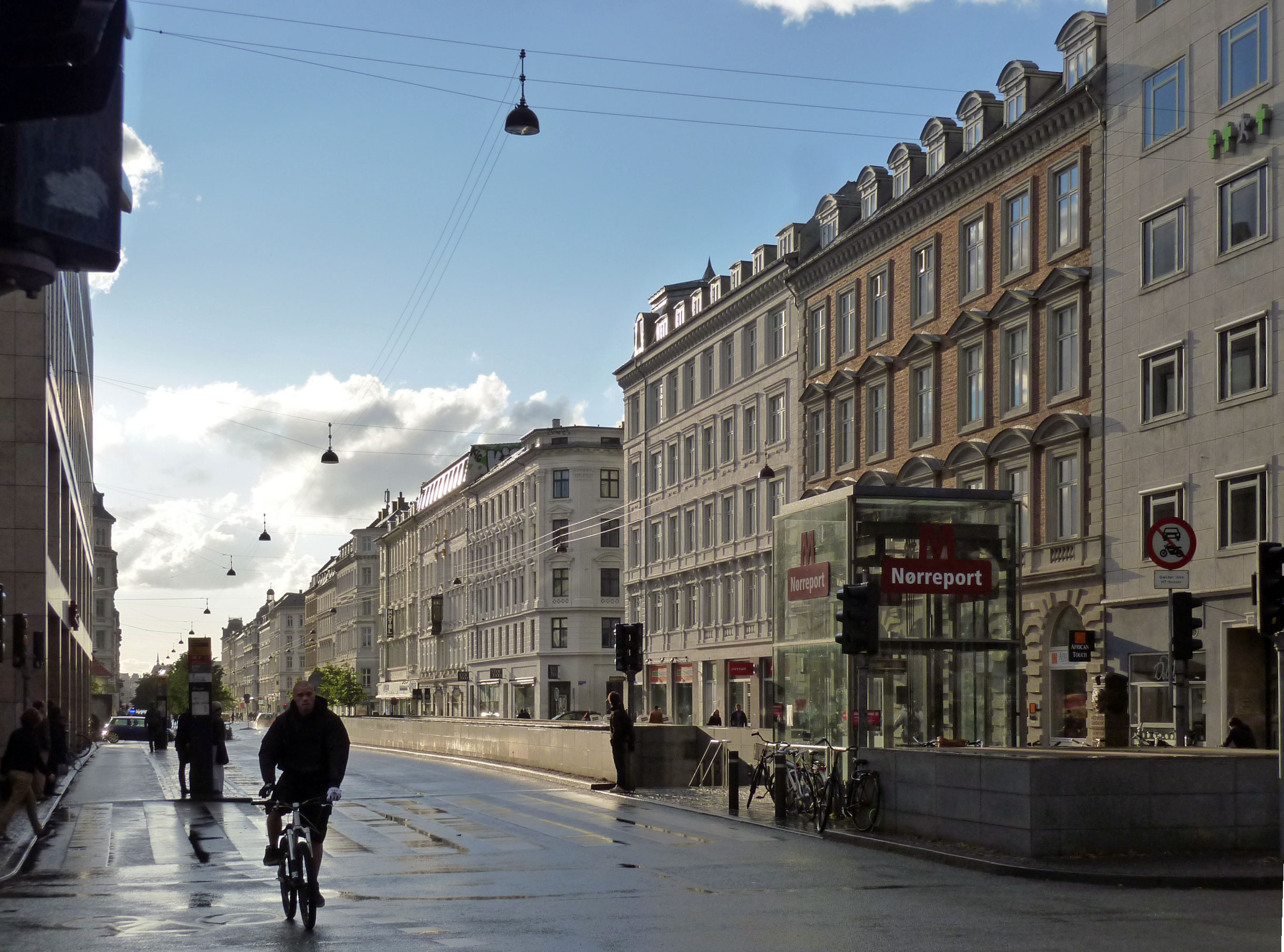 Frederiksborggade at Nørreport Station in Copenhagen, Denmark